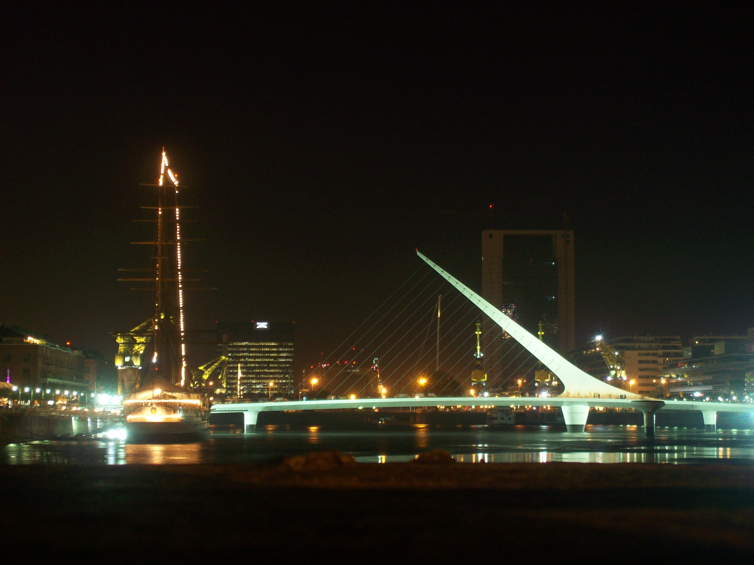 Puente de la Mujer y Buque Museo Corbeta Uruguay en el Dique 3 de Puerto Madero, Buenos Aires, Argentina.